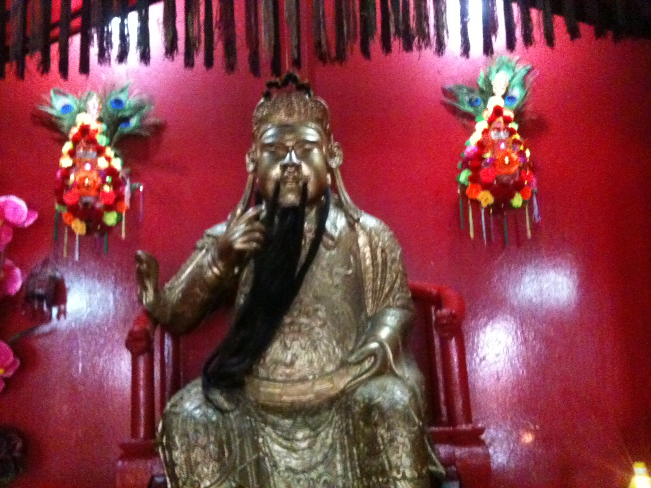 Dieu Guandi